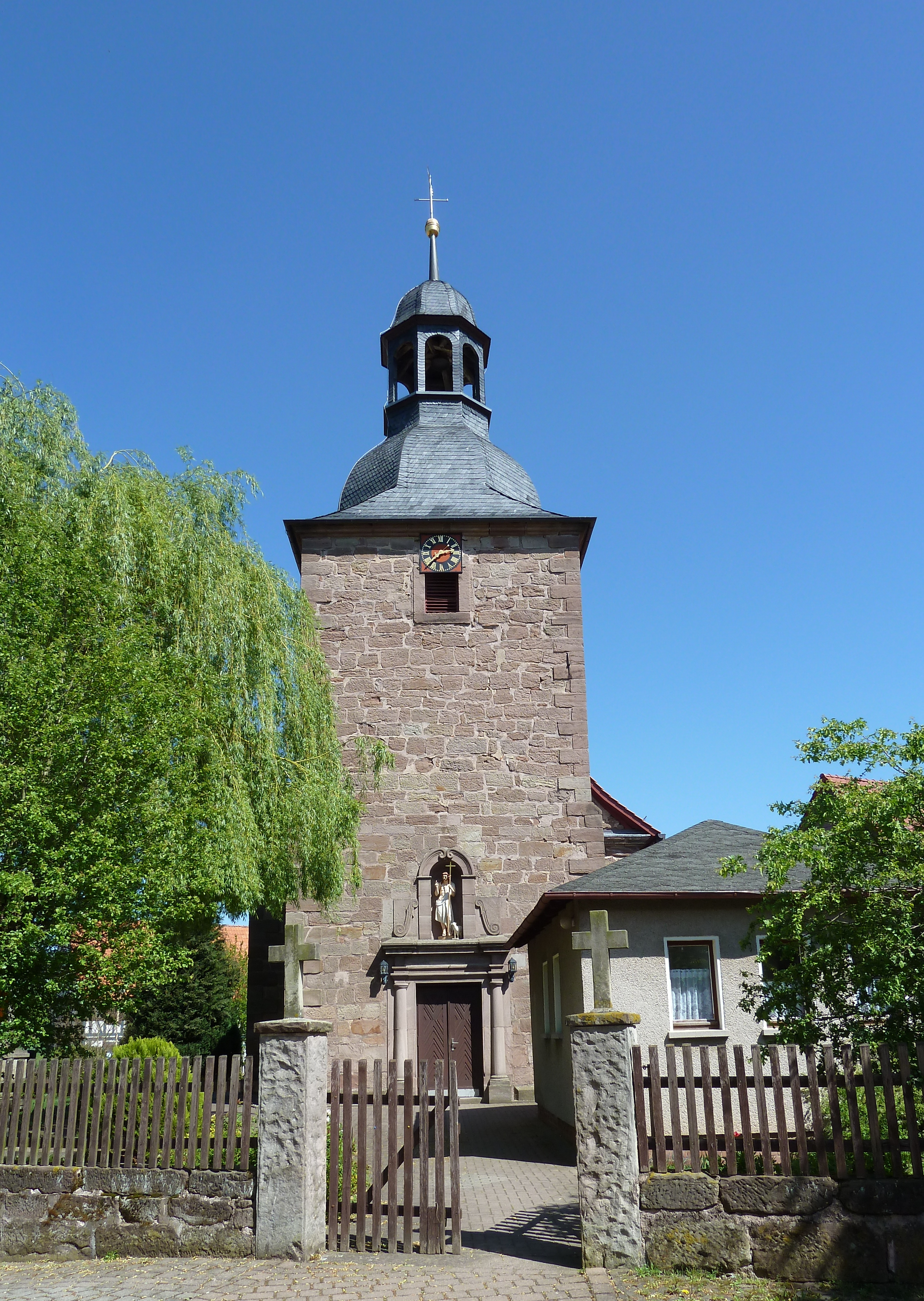 Katholische Kirche St. Johannes der Täufer in Freienhagen, Landkreis Eichsfeld. Erbaut 1777-79, geweiht am 28.10.1779 durch Weihbischof Johann Georg Joseph von Echart, Erfurt